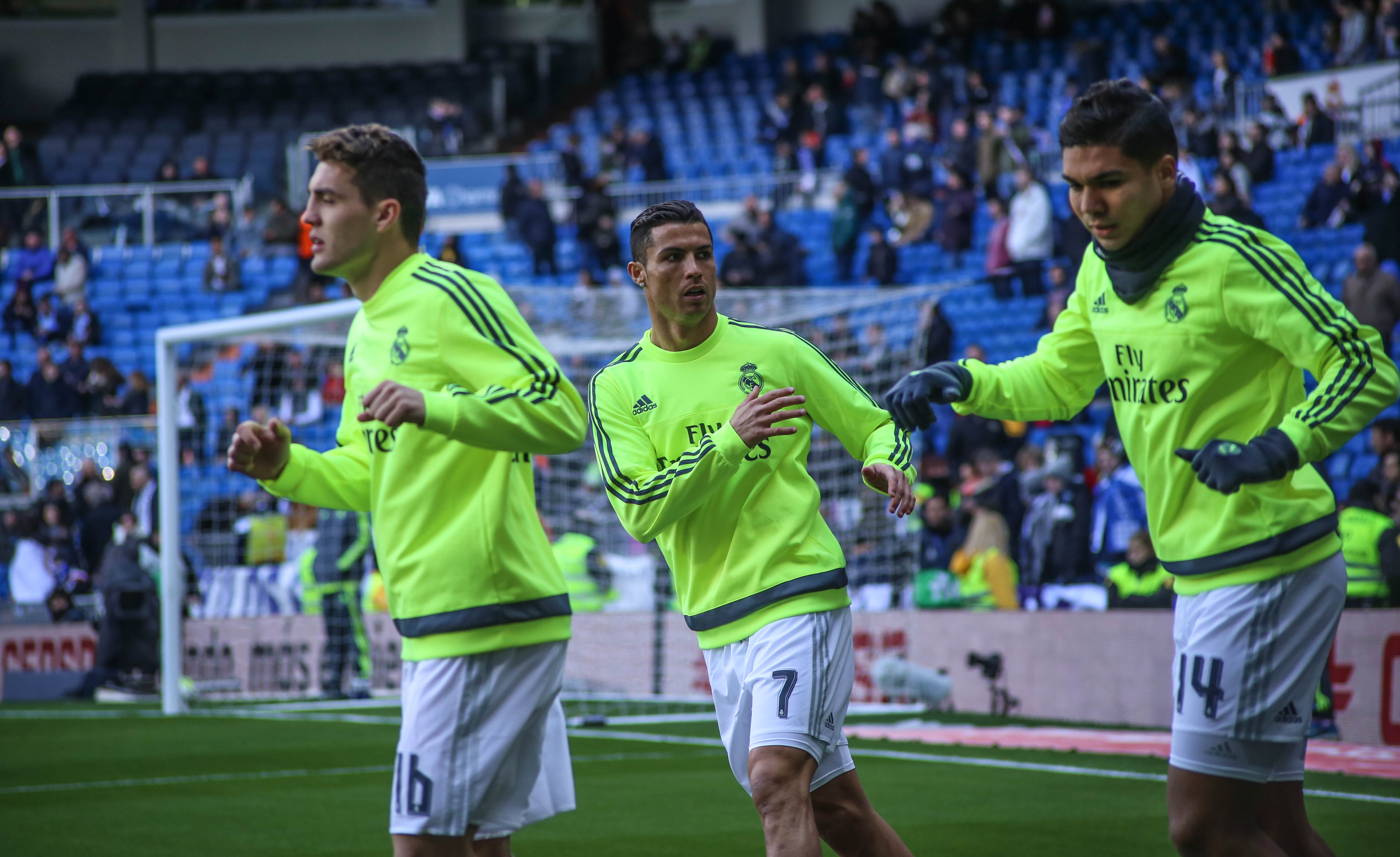 Cristiano Ronaldo entrenando